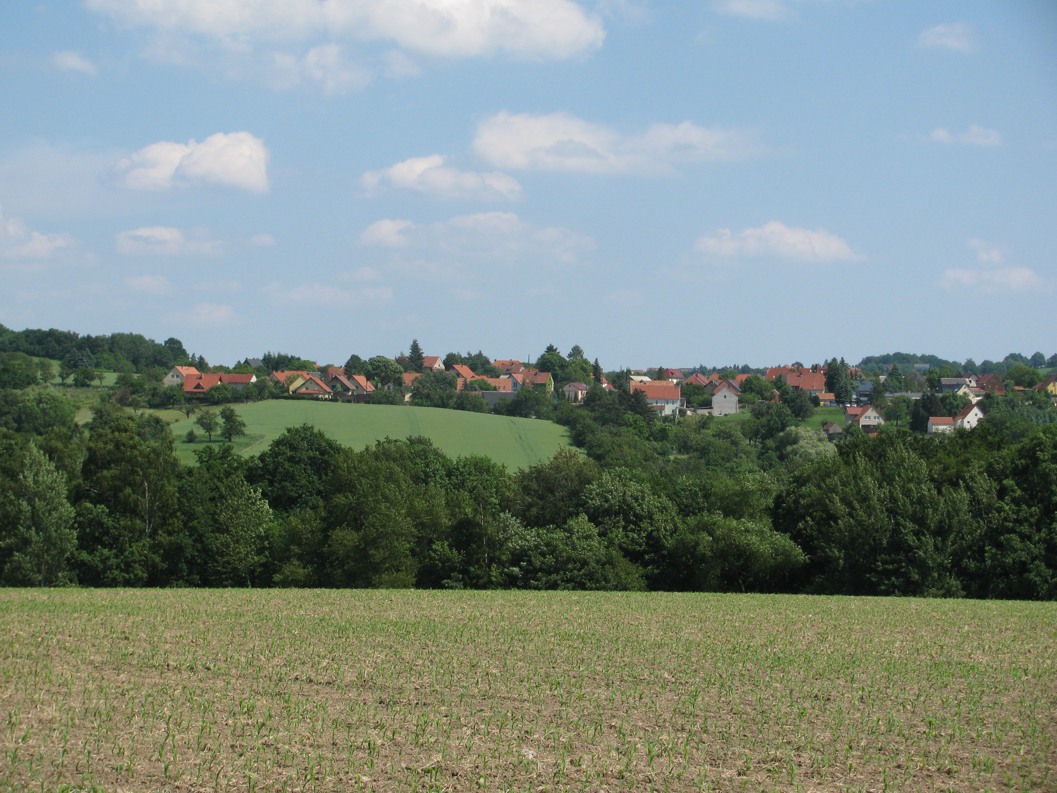 Malschendorf, Ortsteil von Dresden, von Eichbusch aus über den Keppgrund hinweg fotografiert